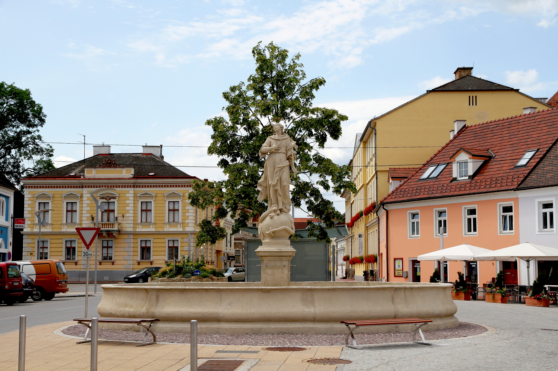 Der Maria-Immaculata-Brunnen am Holzplatz in der niederösterreichischen Stadt Langenlois.